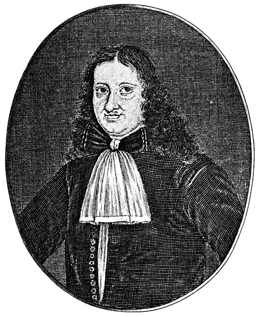 Der Zittauer Rektor und Schriftsteller Christian Weise auf einem Kupferstich von J.C. Böcklin, wahrscheinlich während der jungen Jahre Weises entstanden.